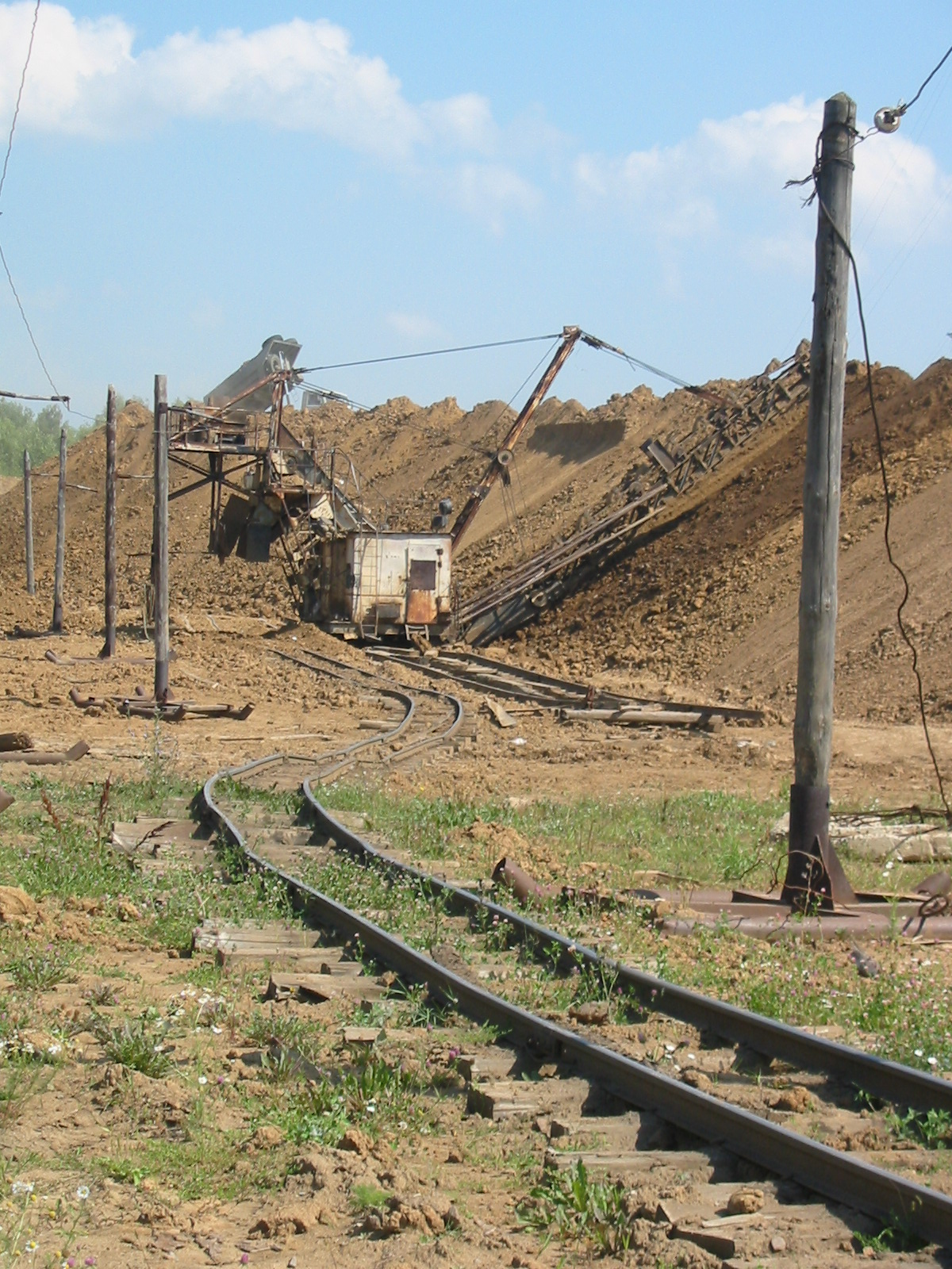 Zaraisk brick factory. Short electrified narrow gague railway seen in 2005. Railway stopped in 2008, demolished in 2009. It uses mining electric locomotives K10 class, rebuild with big cab. УЖД Зарайского кирпичного завода в 2005 году. Электрифицированная железная дорога была закрыта в 2008 году. Была короткой, использовалась для подвоза глины из глинозапасника в цех.